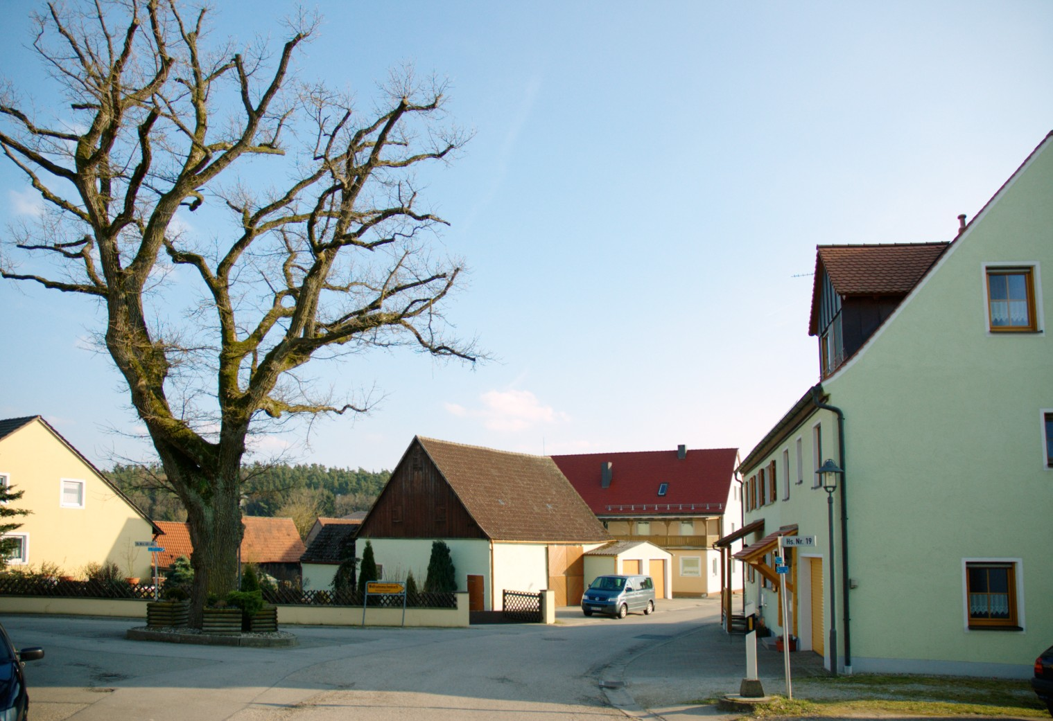 Sauernheim